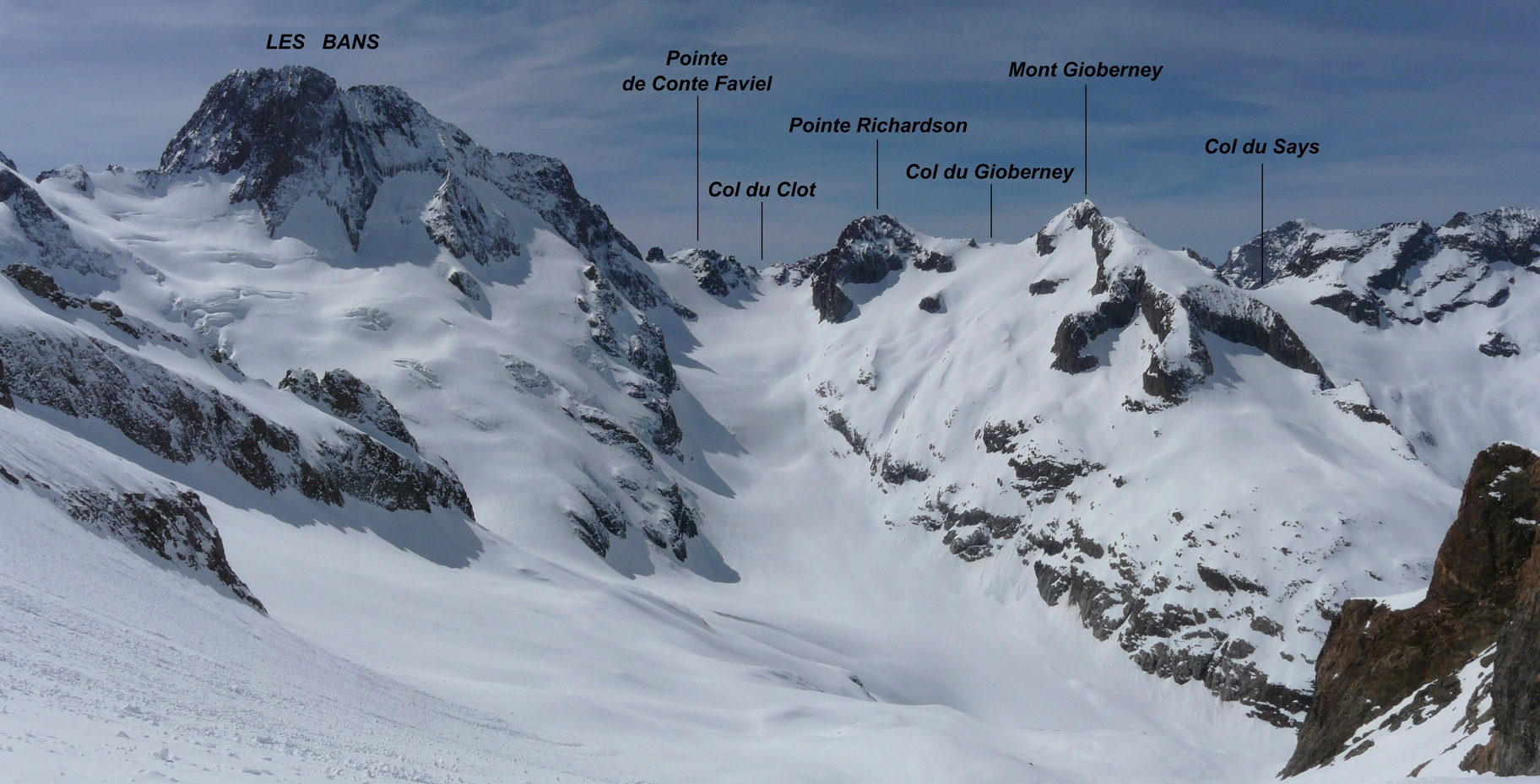 Dal Bans al mont Gioberney (visti da nord). In basso il ghiacciaio de la Pilatte. Massiccio des Écrins.